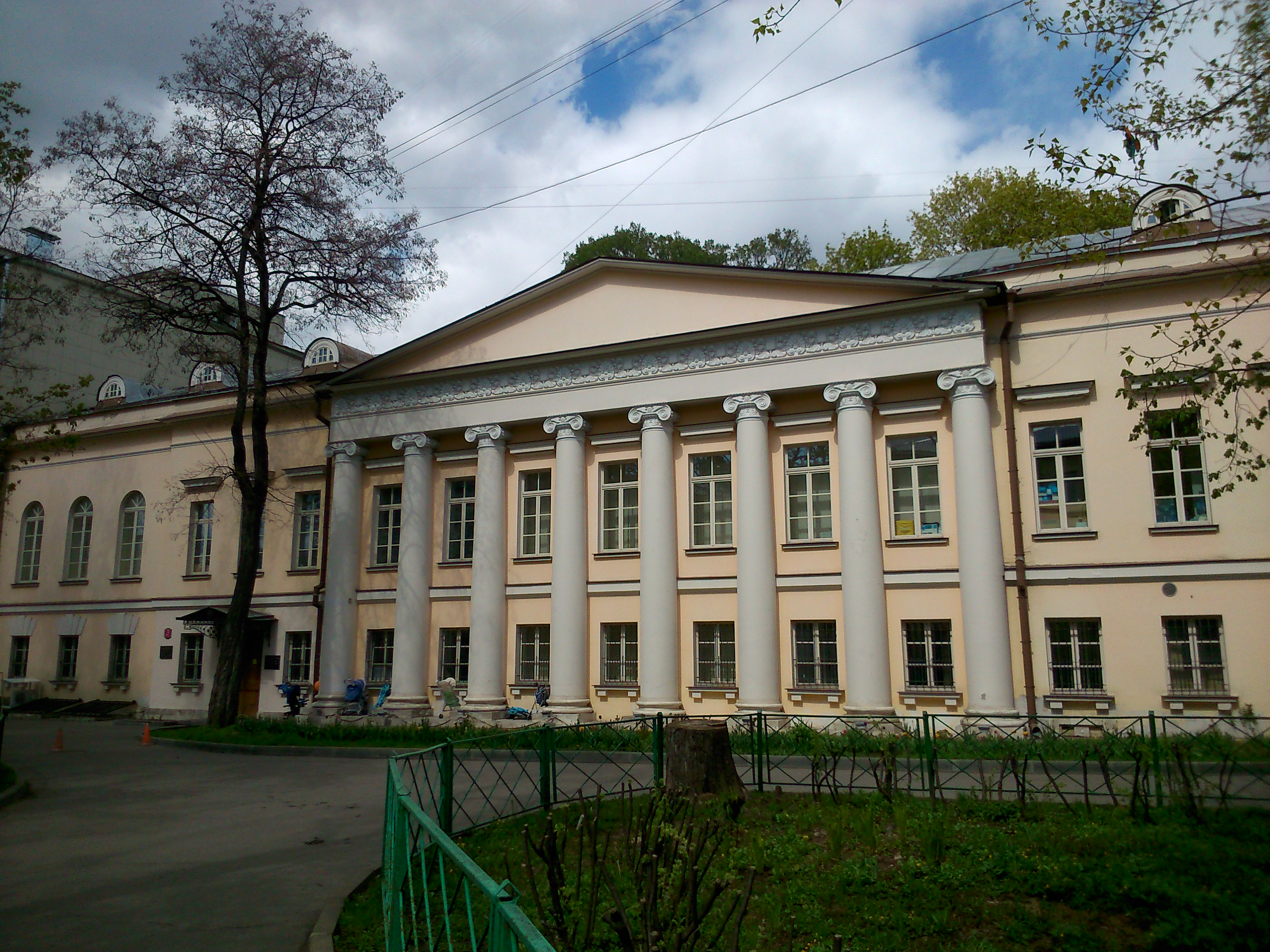 Городская усадьба Небольсиных: Недалеко от станции метро "Краснопресненская", на Садово-Кудринской улице, дом 15, Территория детской Филатовской больницы, Москва, Россия This image is related to the protected area of Russia number 7710438